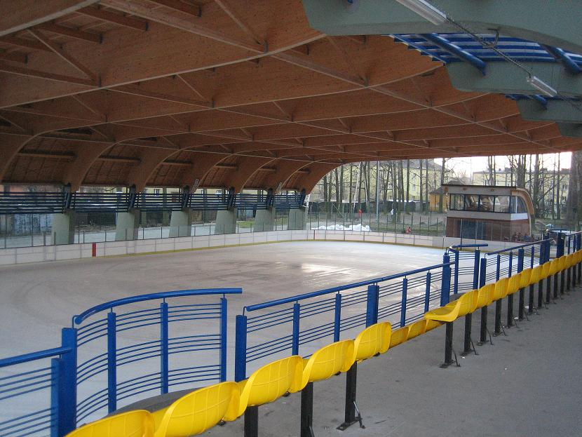 Pszów - lodowisko. Autor zdjęcia: Daro998